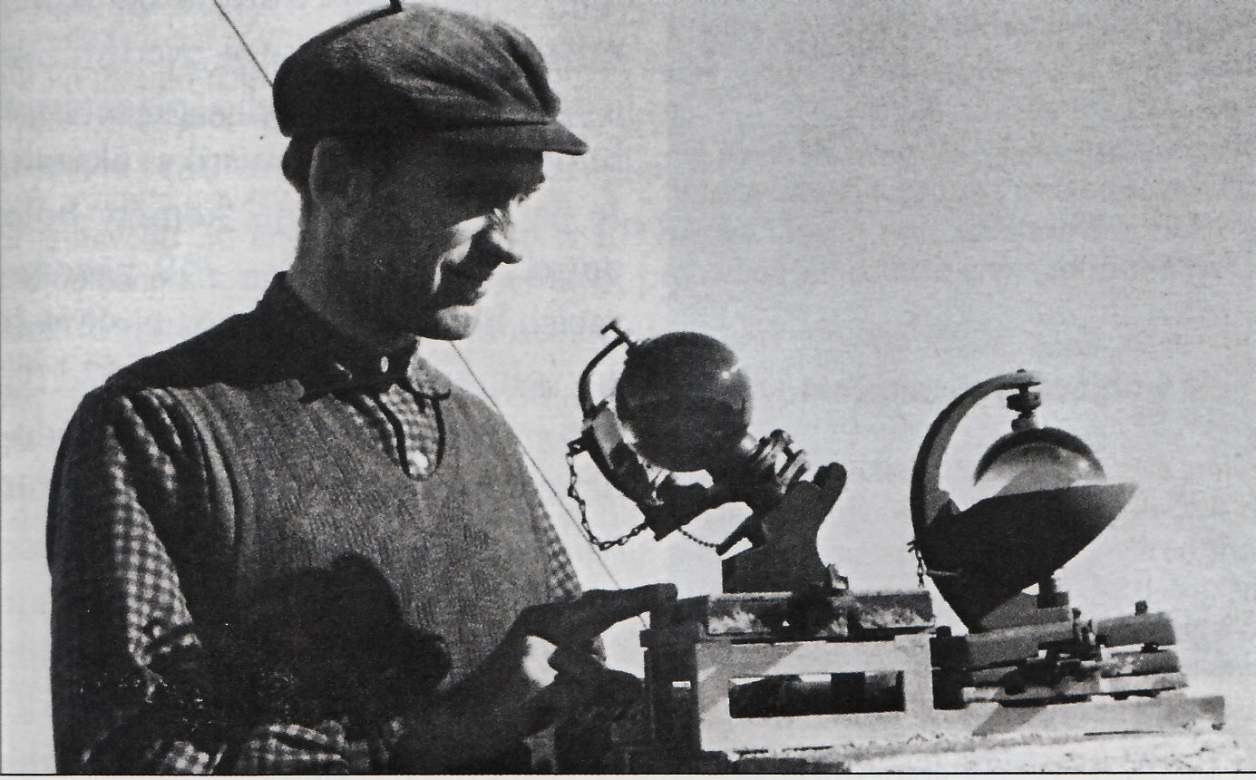 Doc. RNDr. Antonín Mrkos, CSc. (* 27. január 1918, Střemchoví – † 29. máj 1996, Praha) bol český astronóm. Vyštudoval astronómiu na Prírodovedeckej fakulte Slovenskej univerzity v Bratislave. V rokoch 1946 až 1950 pracoval na astronomickom observatóriu na Skalnatom plese, neskôr (1950 až 1961) na observatóriu na Lomnickom štíte vo Vysokých Tatrách.